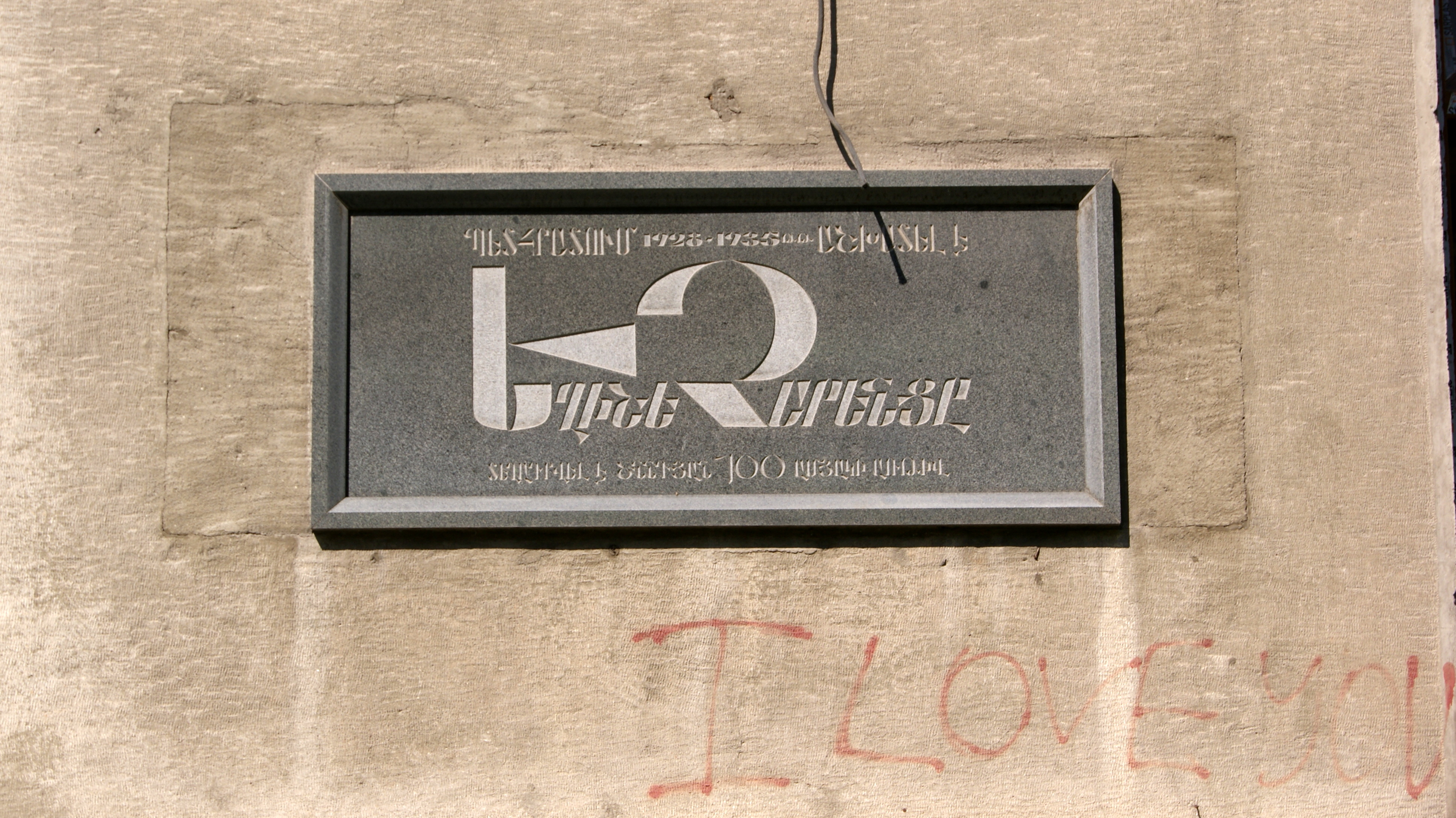 Գրքի պալատի շենքի Տերյան փող. հատվածը 6/67